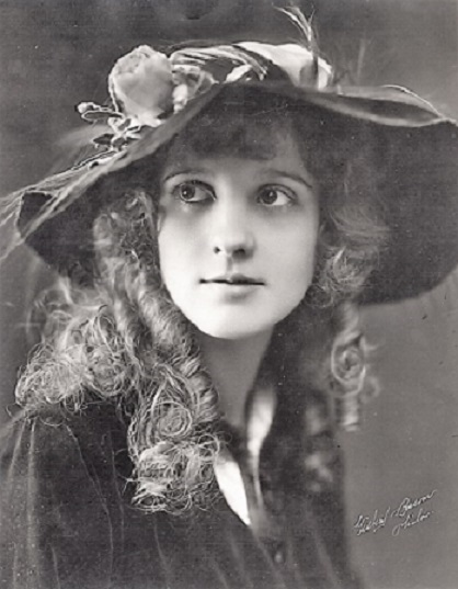 Louise Huff